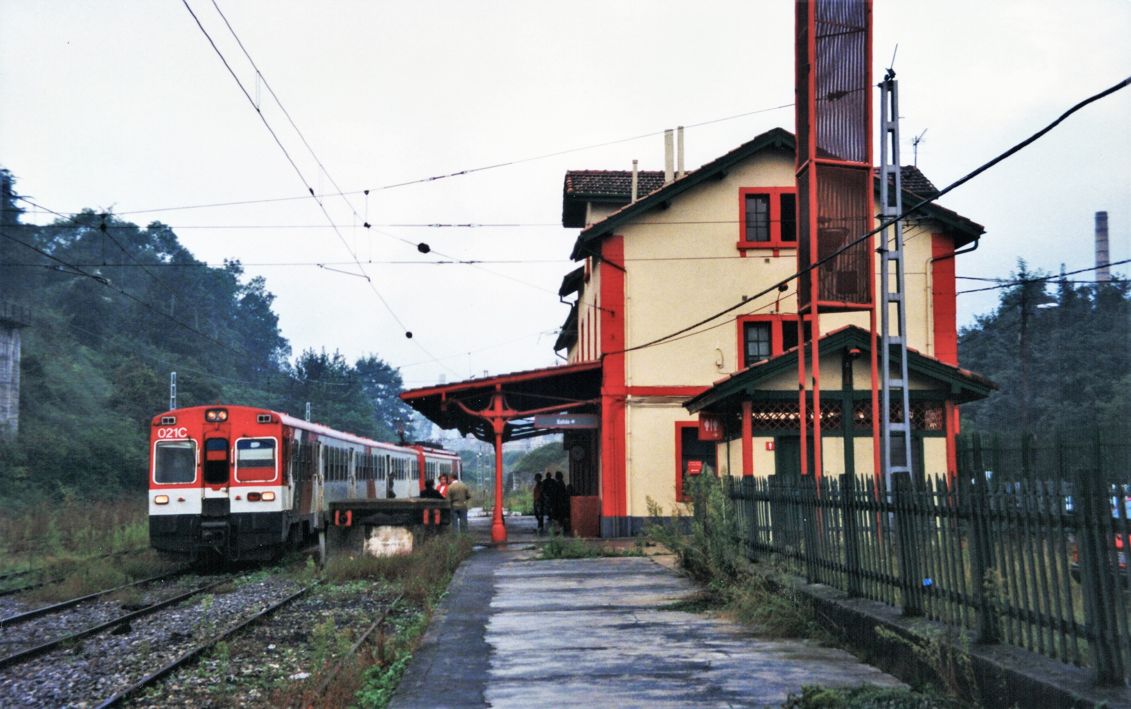 Unidad de la serie 440 en la estación de Renfe de Trubia en septiembre de 1996, unos meses antes de su cierre.